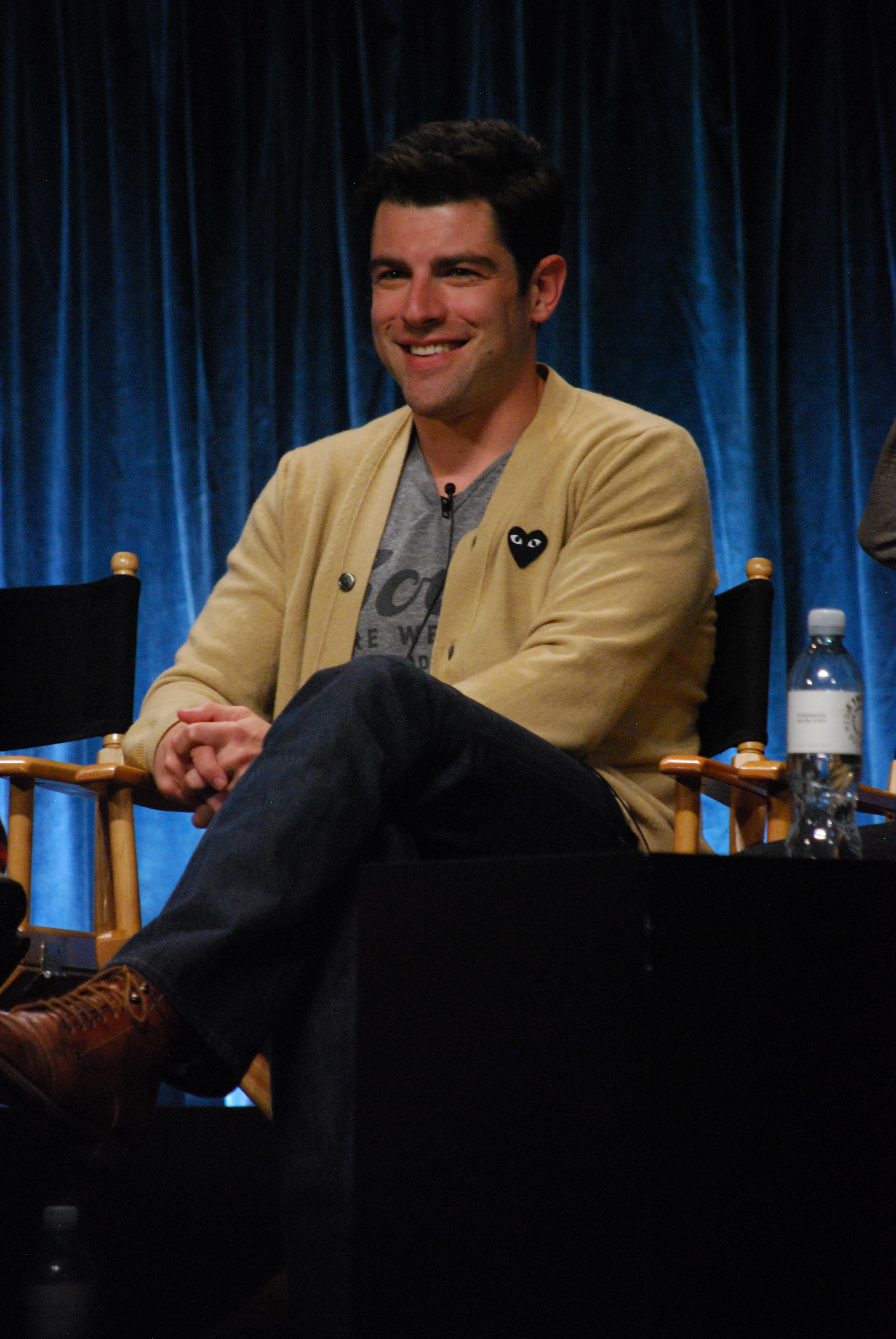 Max Greenfield